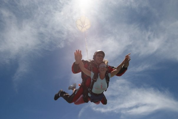 Salto tipo tandem, donde 2 personas usan 1 solo paracaidas